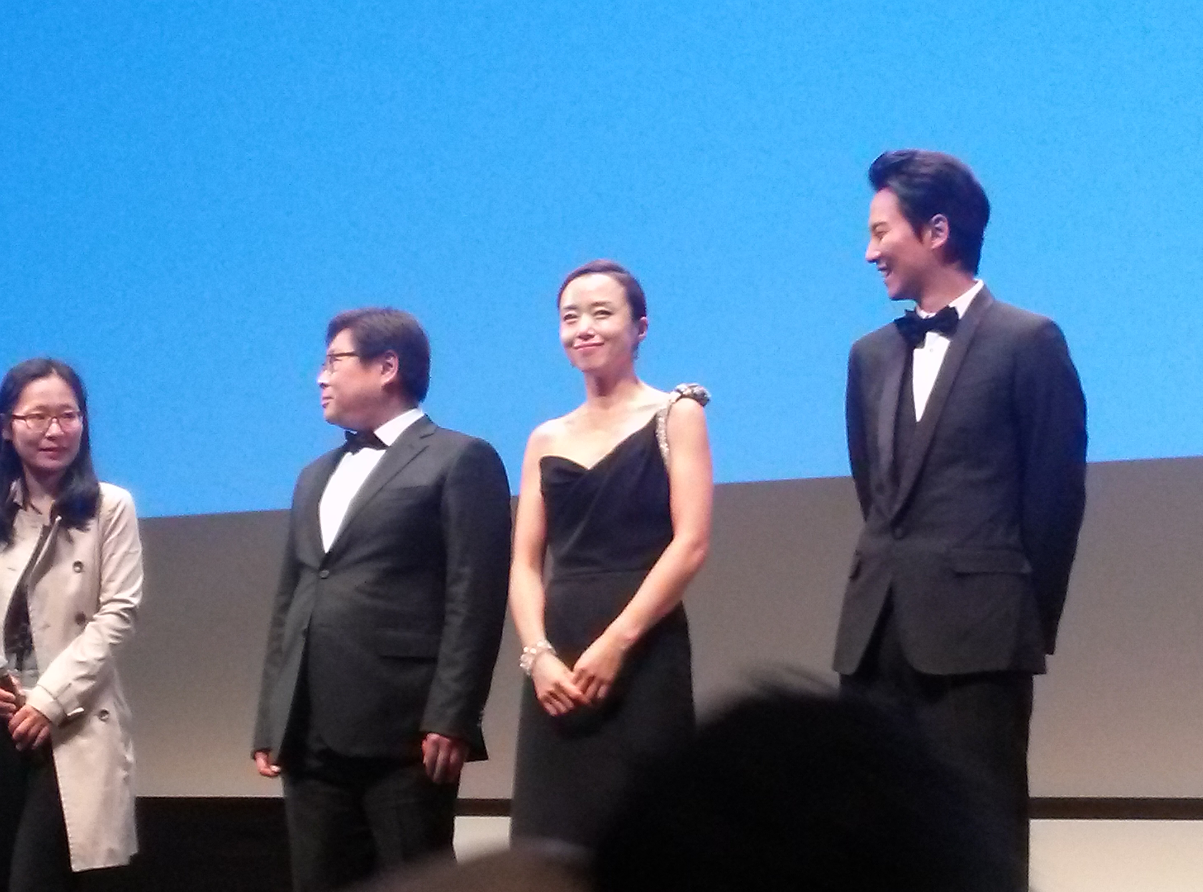 Présentation du film The Shameless à Un certain regard à Cannes en 2015 : de gauche à droite le réalisateur Oh Seung-uk, l'actrice Jeon Do-yeon et l'acteur Kim Nam-gil.